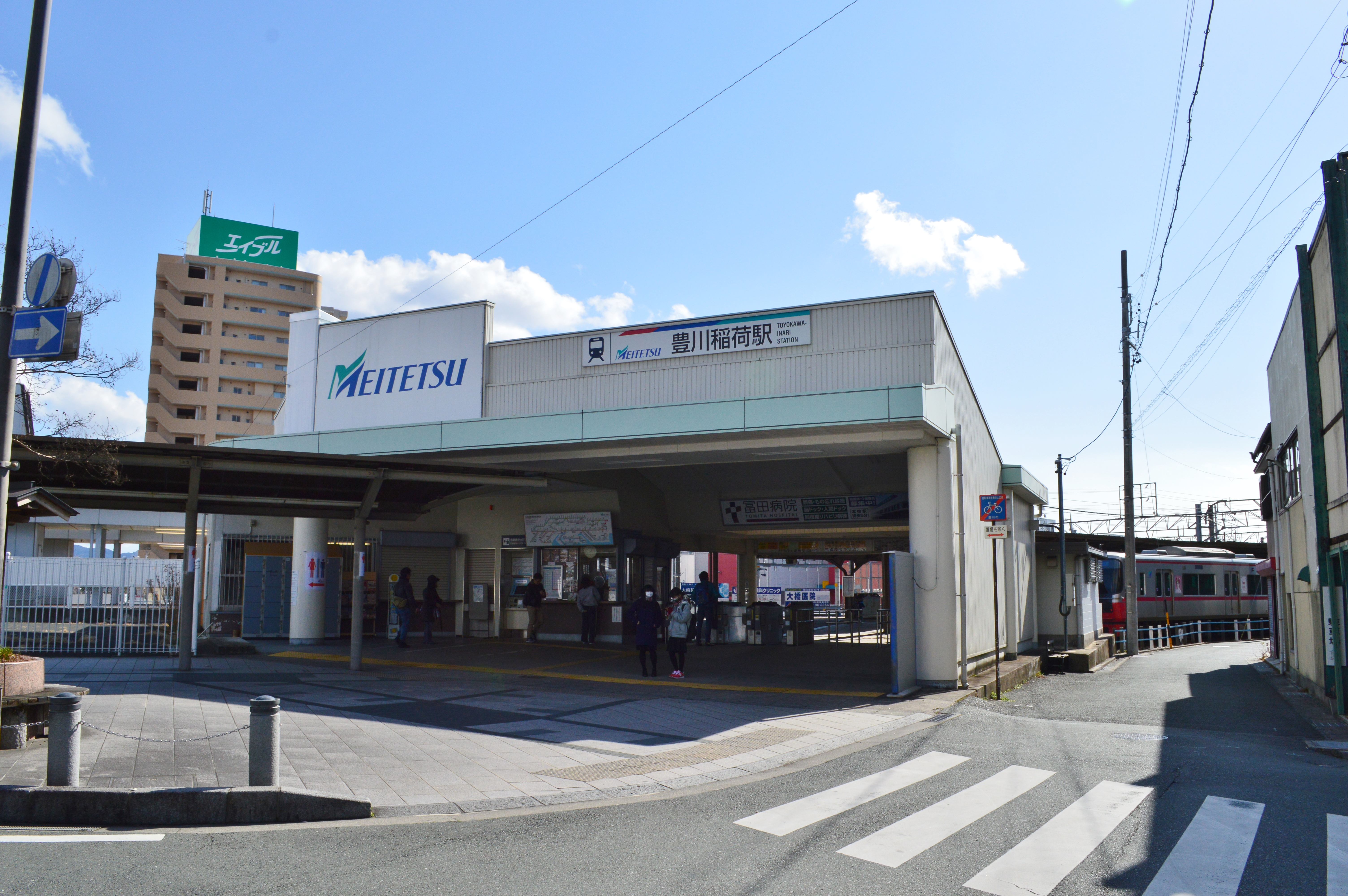 豊川稲荷駅 駅舎